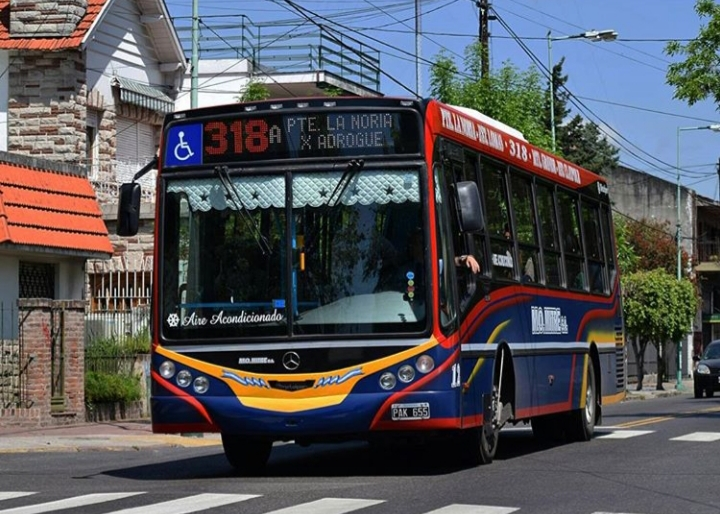 Colectivo de la línea 318 de la empresa M.O. Mitre circulando por Lomas de Zamora.